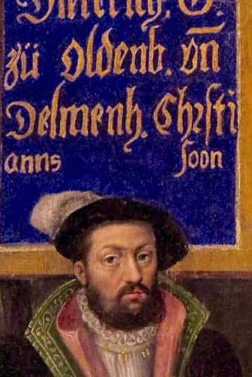 Didrik den Lykkelige, greve af Oldenborg og Delmenhorst, fra anetavle i Rosenborg Slot, København